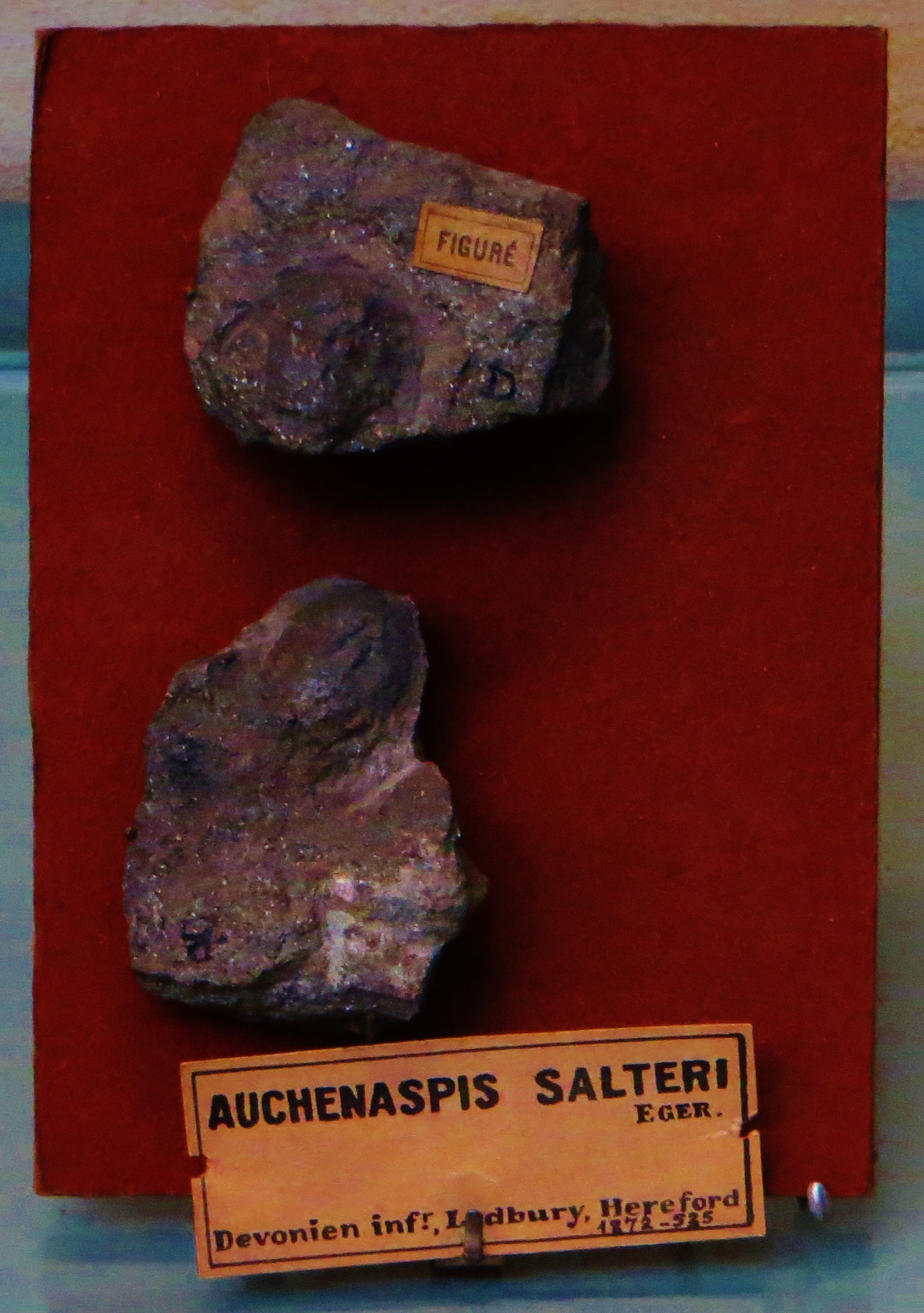 Fossil of Auchenaspis, an extinct fish. Took the photo at Museum Histoire Naturelle, Paris